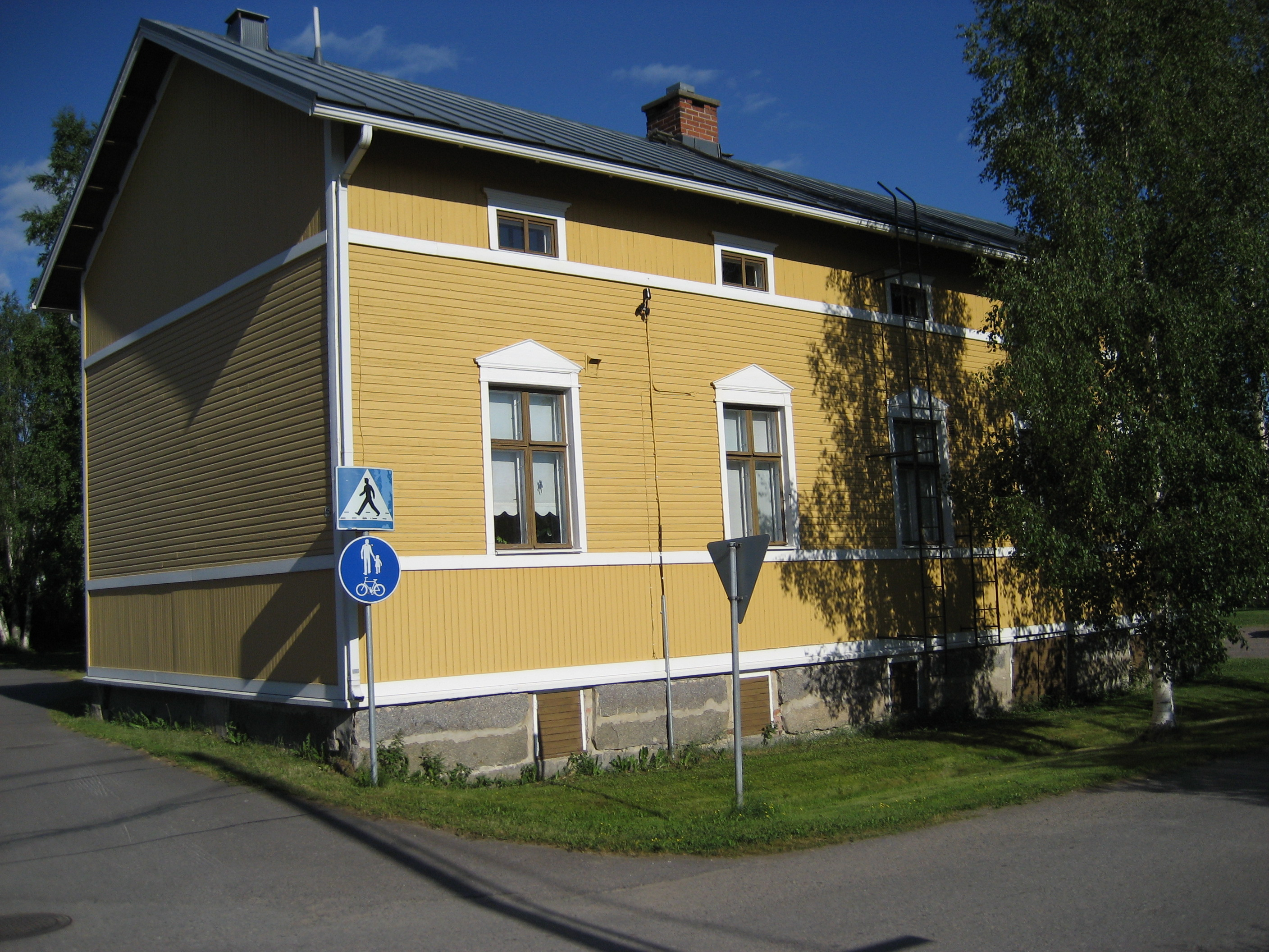 Väinölän kartanon päärakennusta Oulaisissa vuonna 2006